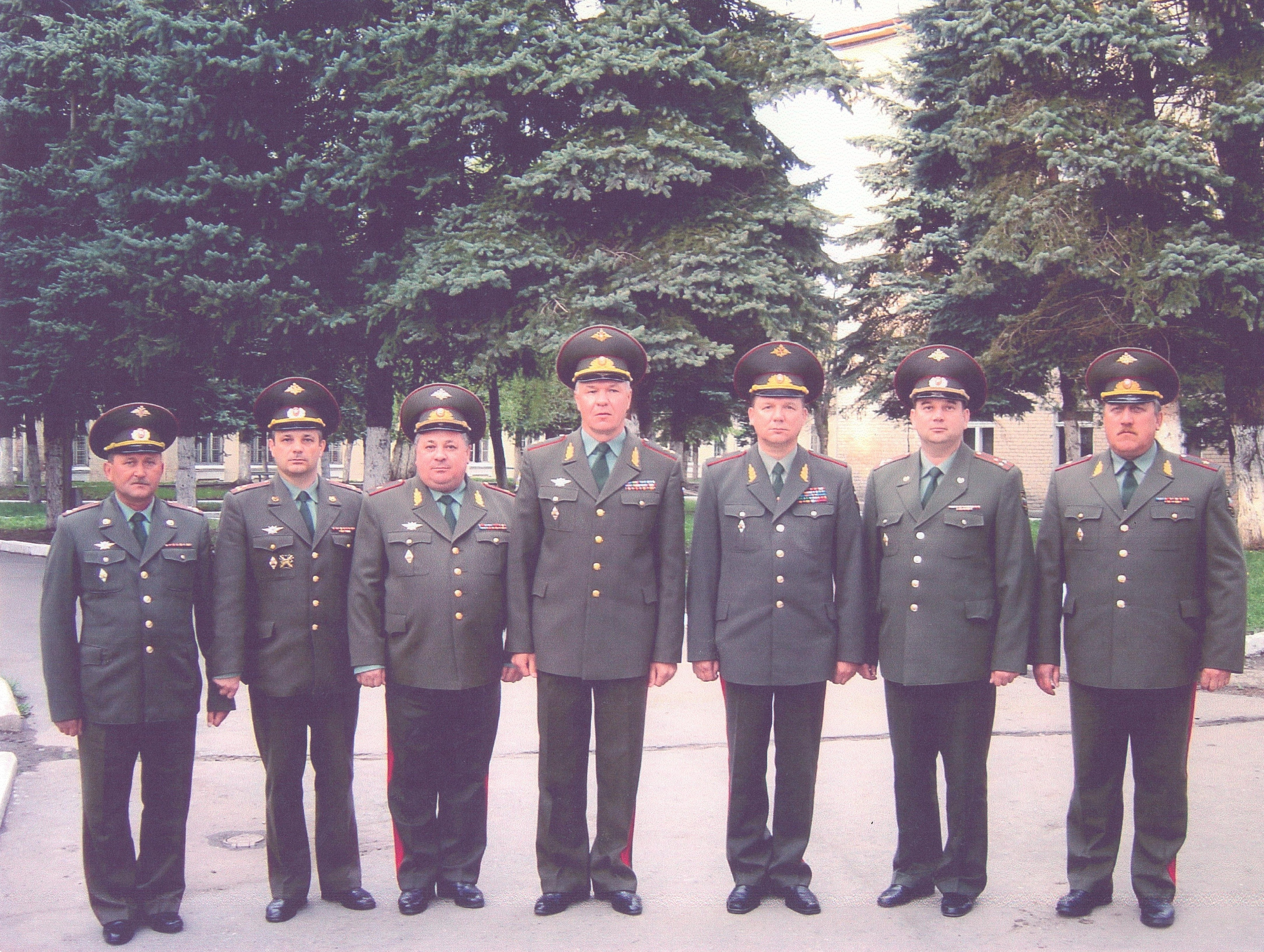 Состав военного совета 58 армии, апрель 2005 года, Владикавказ.